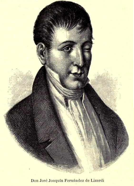 Imagen extraida del libro de Vicente Riva Palacio, Julio Zárate (1880) "México a través de los siglos" Tomo III: "México Independiente" (1808 - 1821)